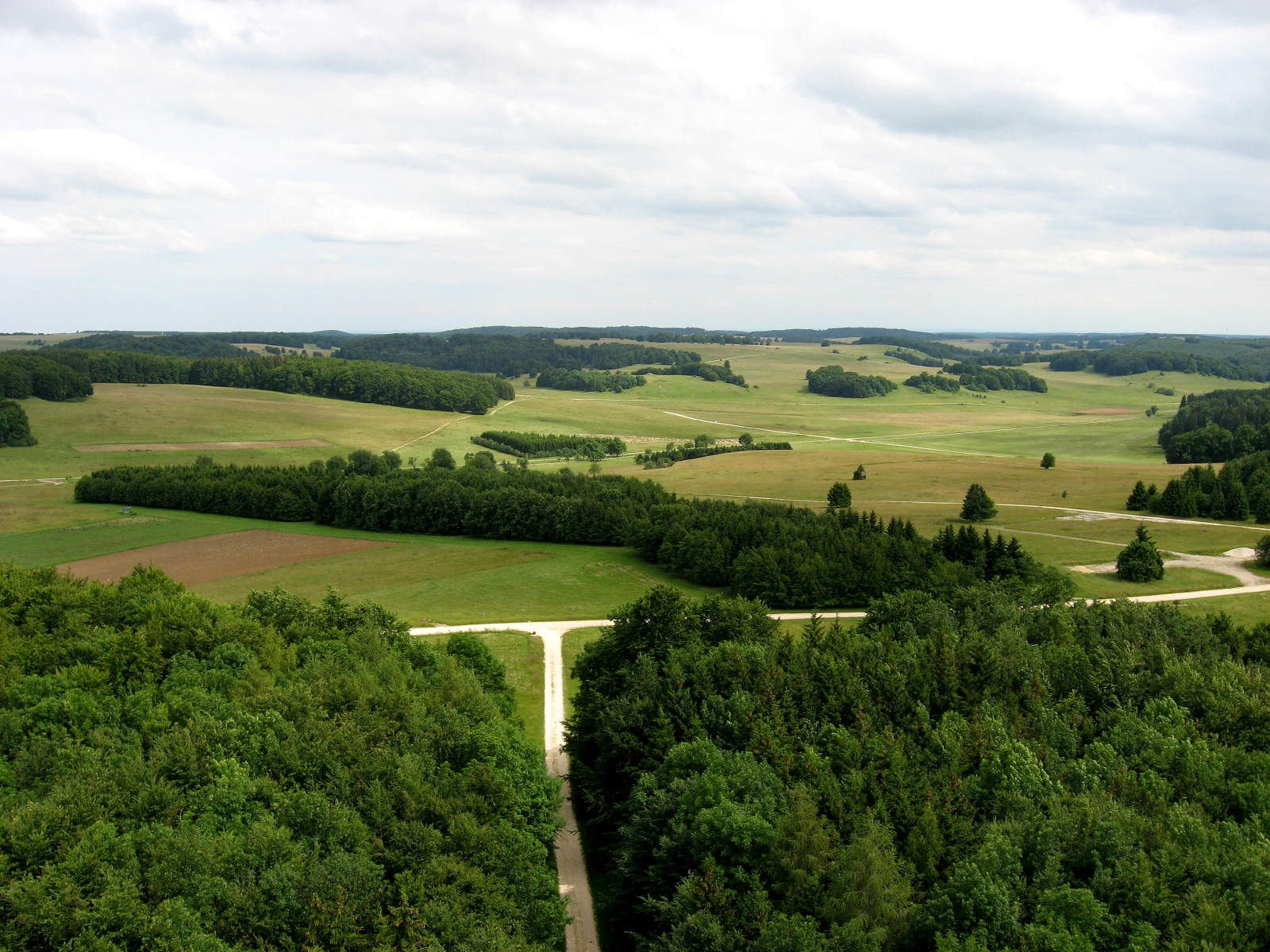 northern Münsinger Hardt